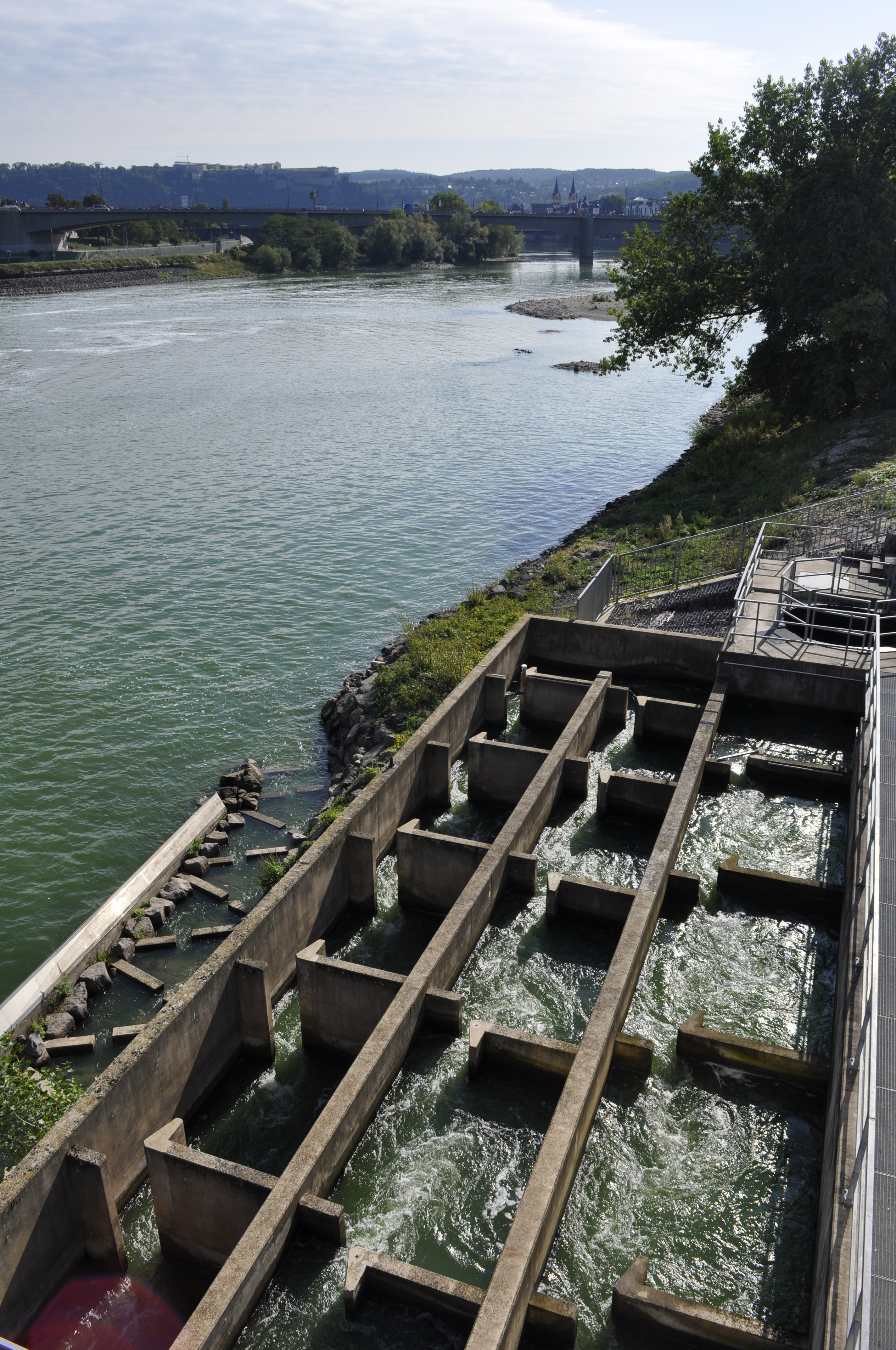 Der Fischpass von der Ebene "Ausblick"